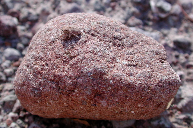 Habronattus ustulatus from Baja California.